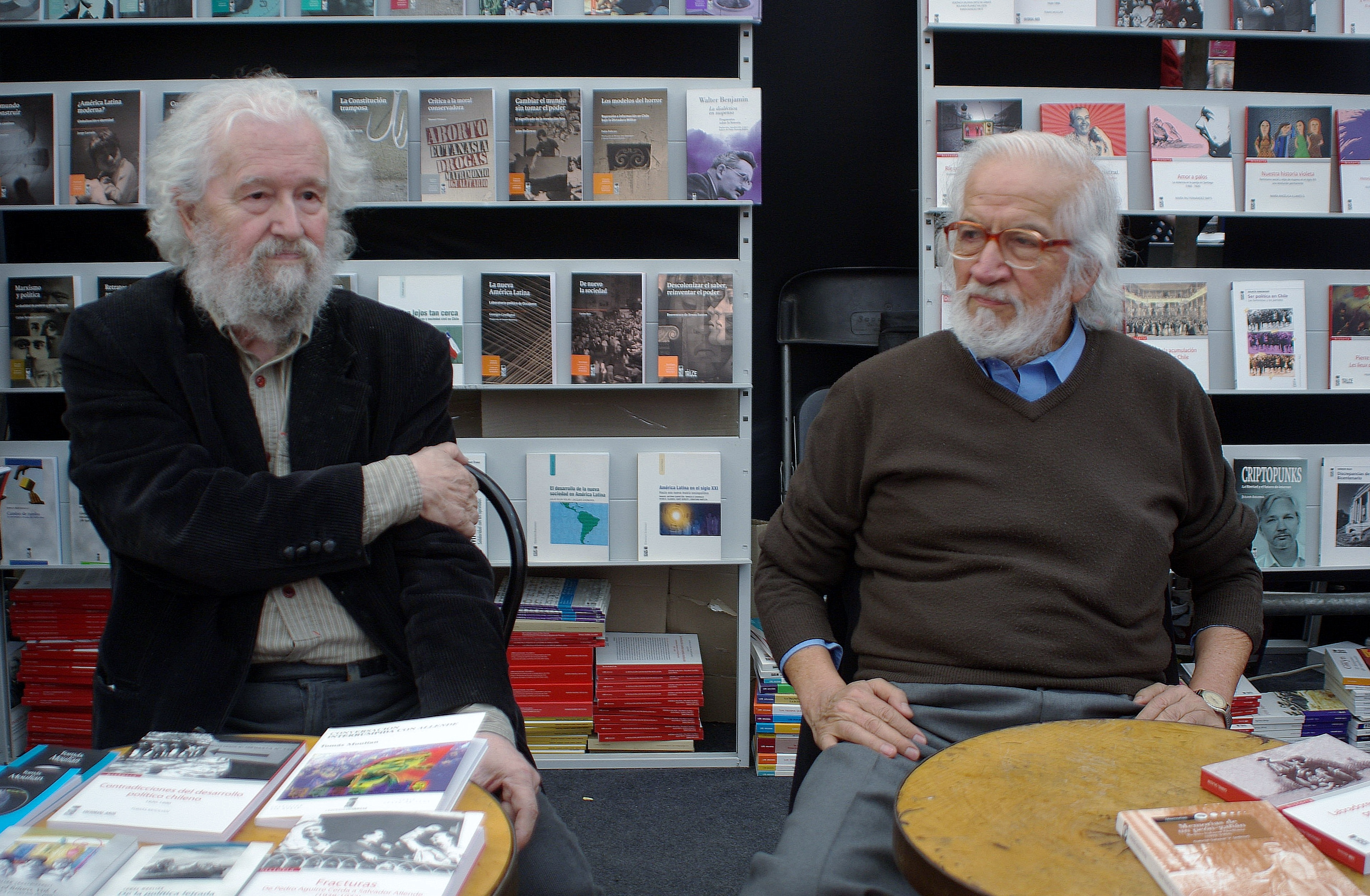 El sociólogo Tomás Moulian (izq.) y el historiador Gabriel Salazar en la Feria Internacional del Libro de Santiago 2015